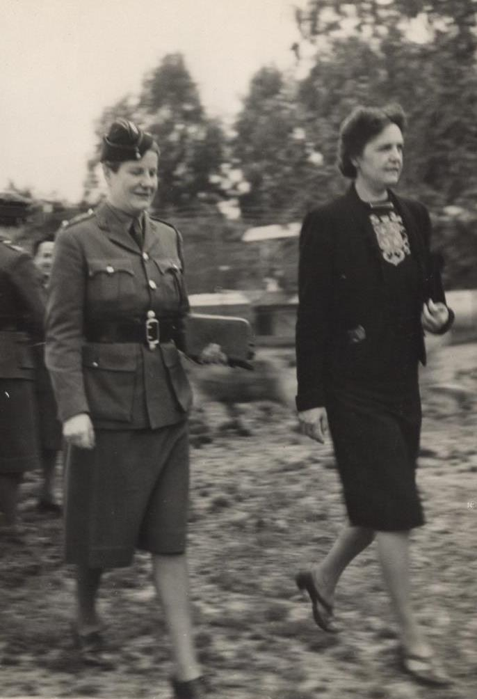 הדסה עם המפקדת הלן פיין